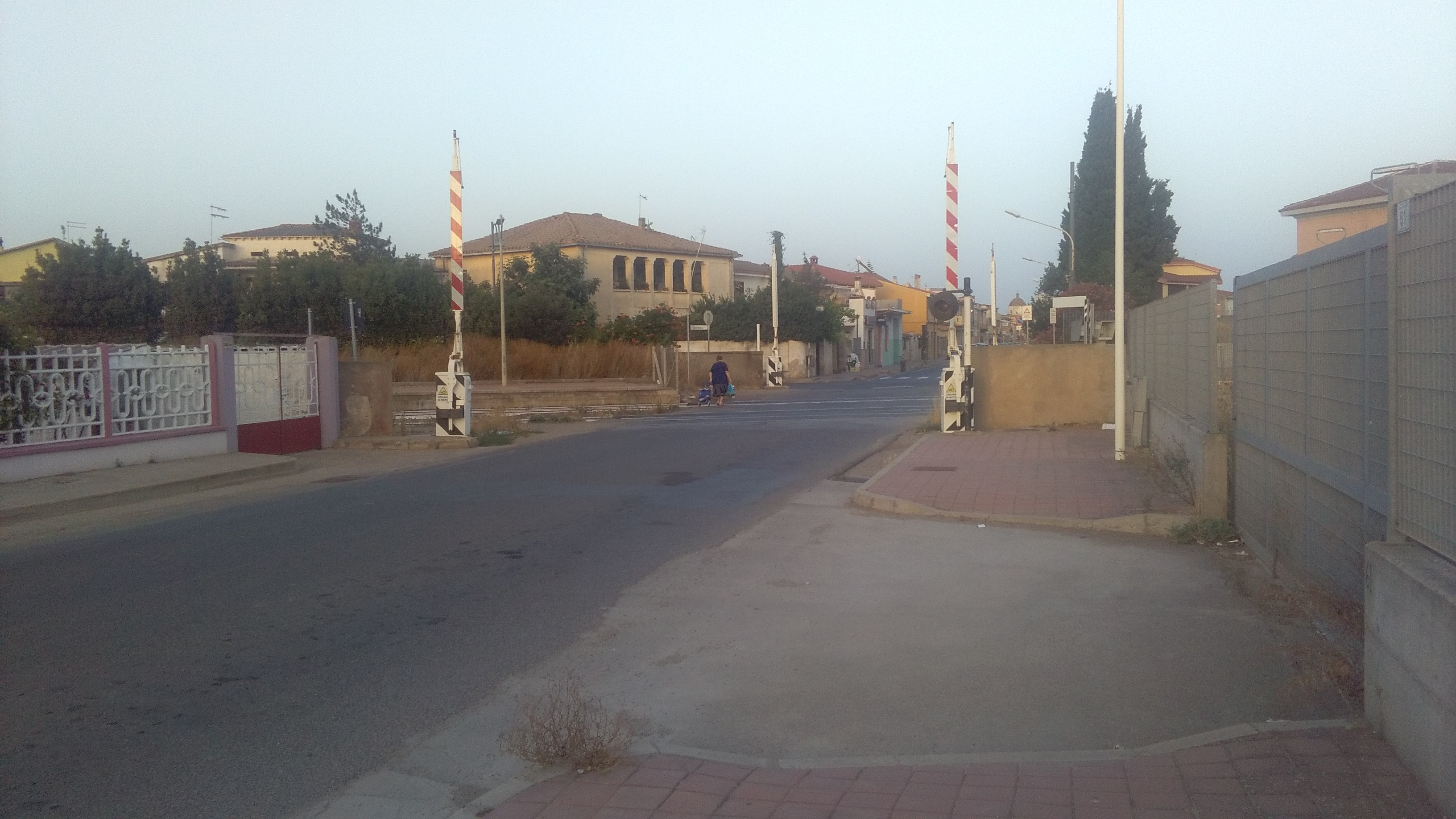 Passaggio a livello a fianco alla stazione di Villasor